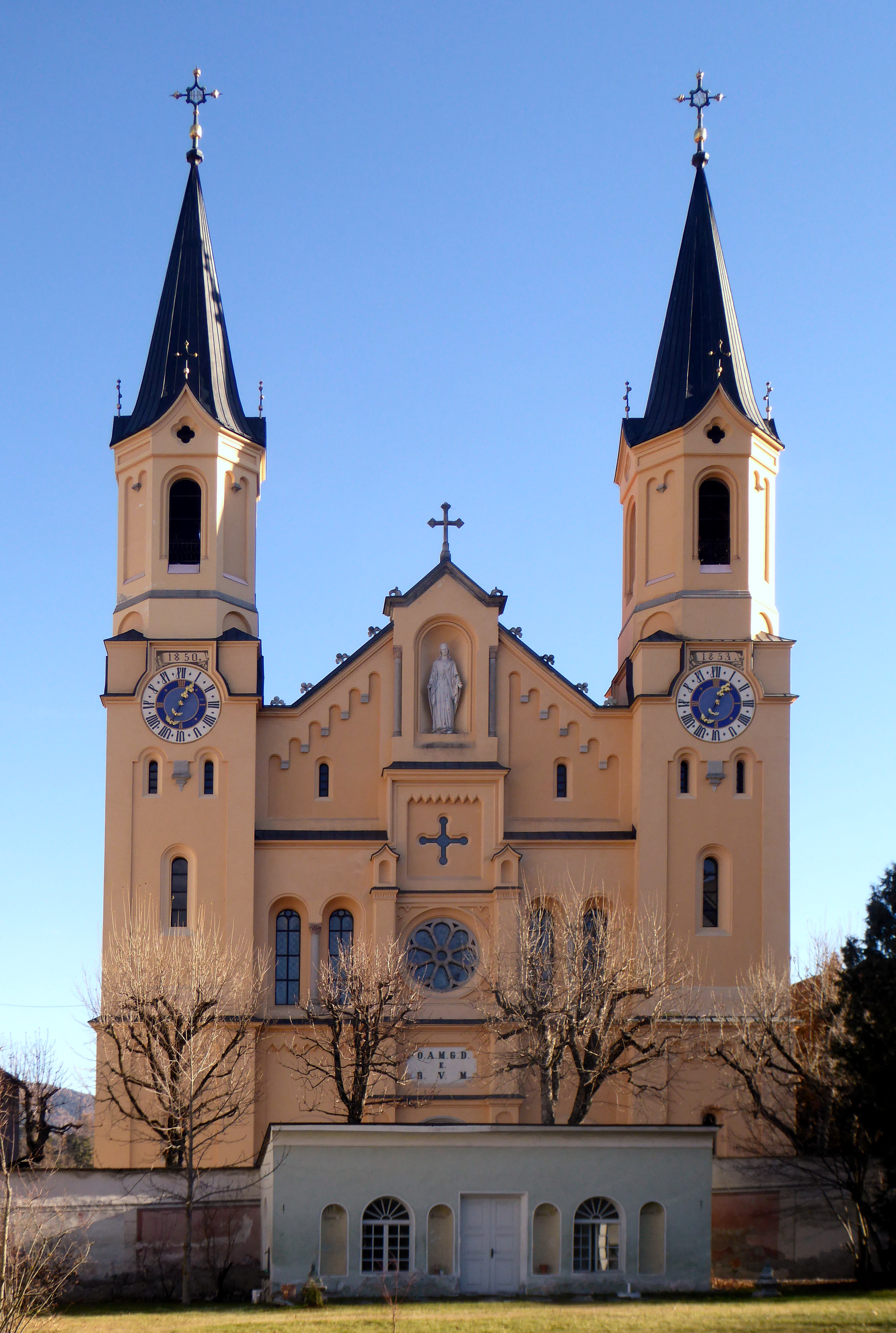 Bruneck (Südtirol), Pfarrkirche Mariä Himmelfahrt, von Westen gesehen.